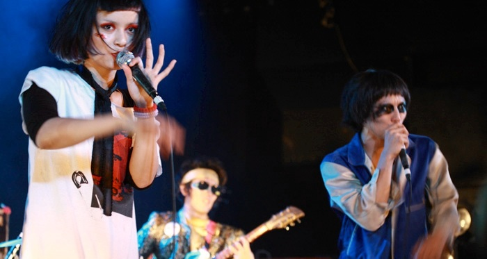 Syukugawa